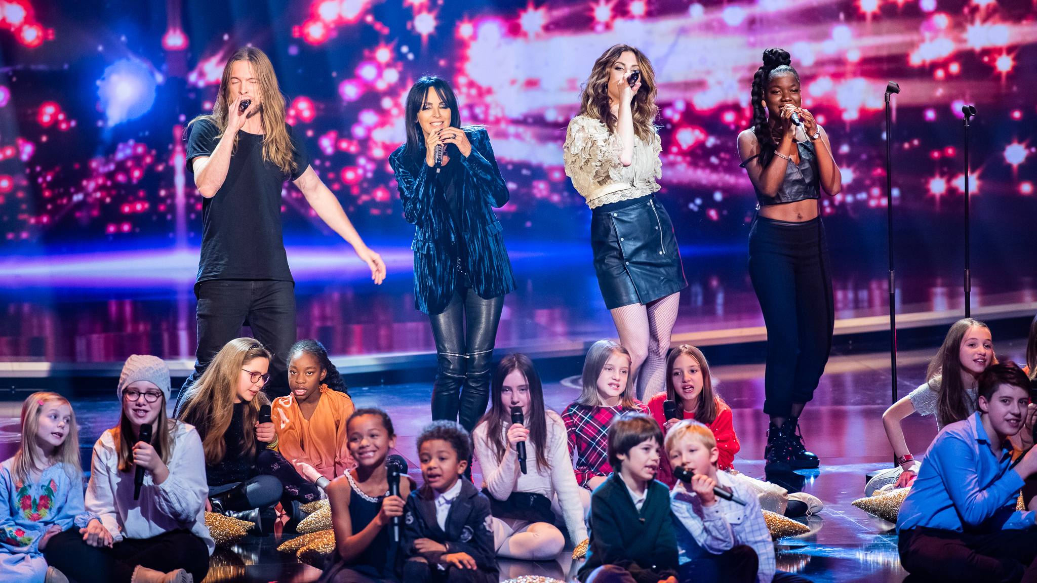 BR,Bayerisches Fernsehen,Frankenhalle,Live-Sendung,Nena,Sternstunden-Gala,Sternstundengala